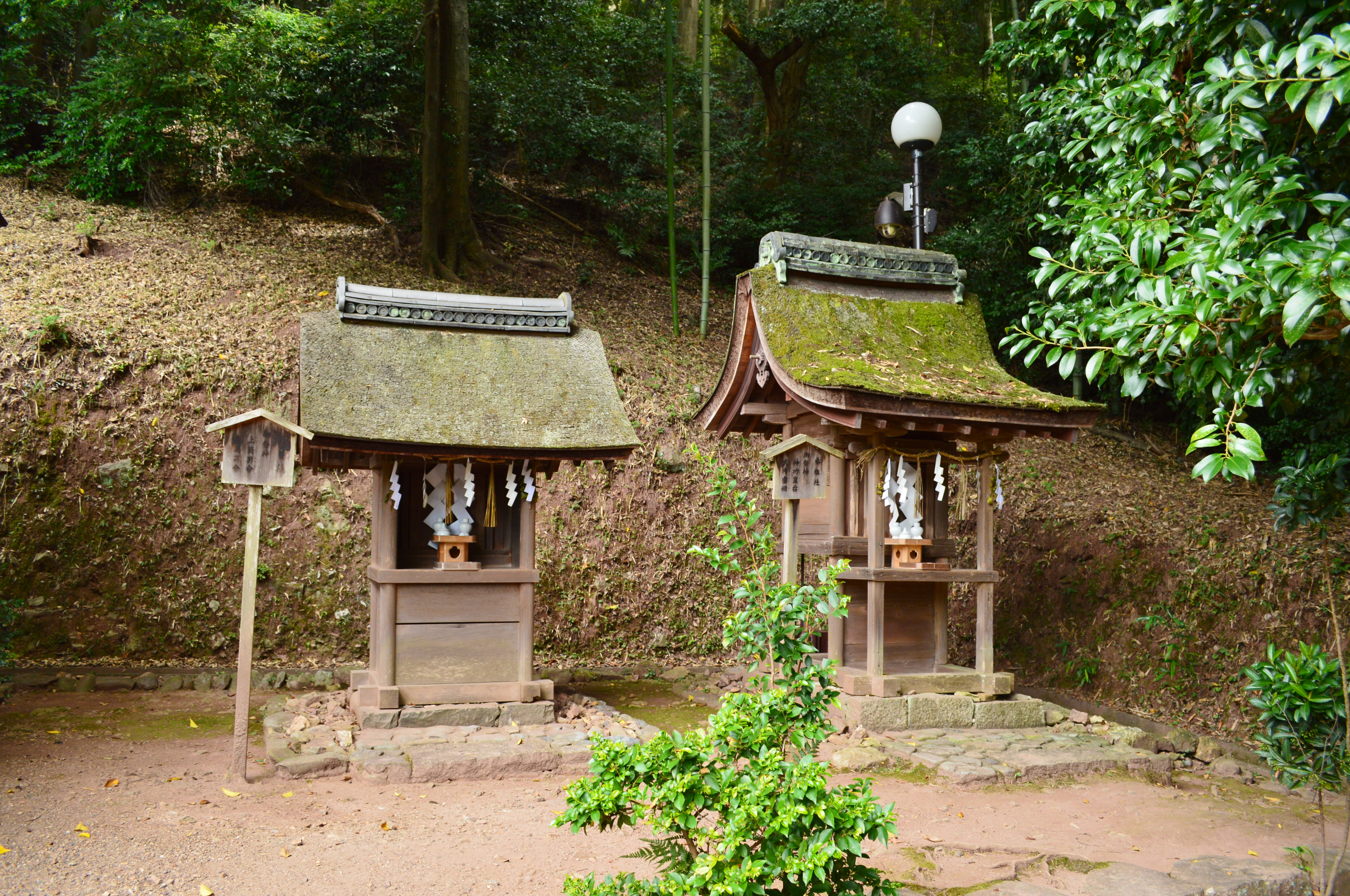 宇治上神社 境内社